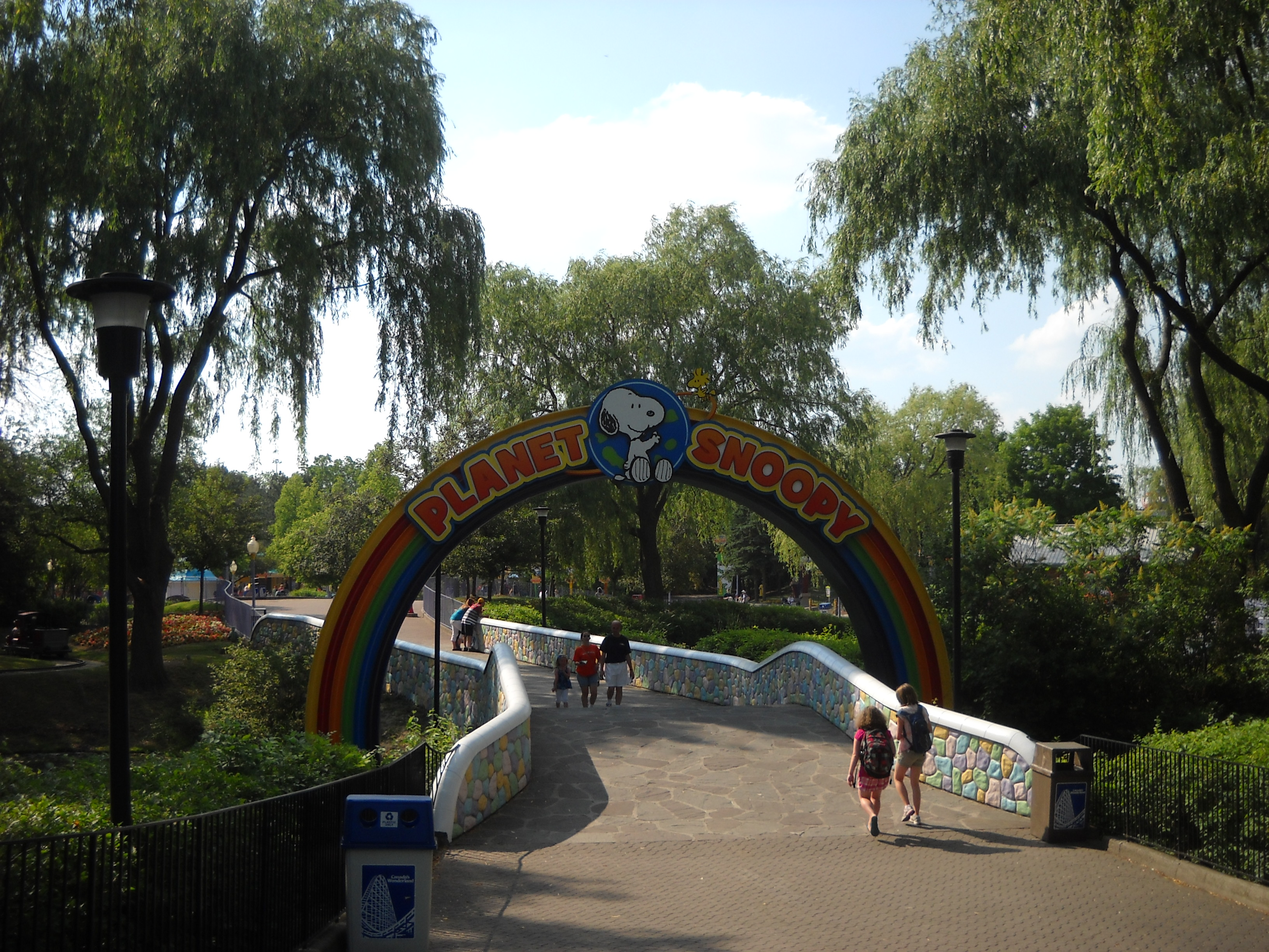 Depois de várias montanhas-russas sob o sol escaldante, resolvi dar um respiro vendo a parte Peanuts do parque (que é bem infantil, mas calma)